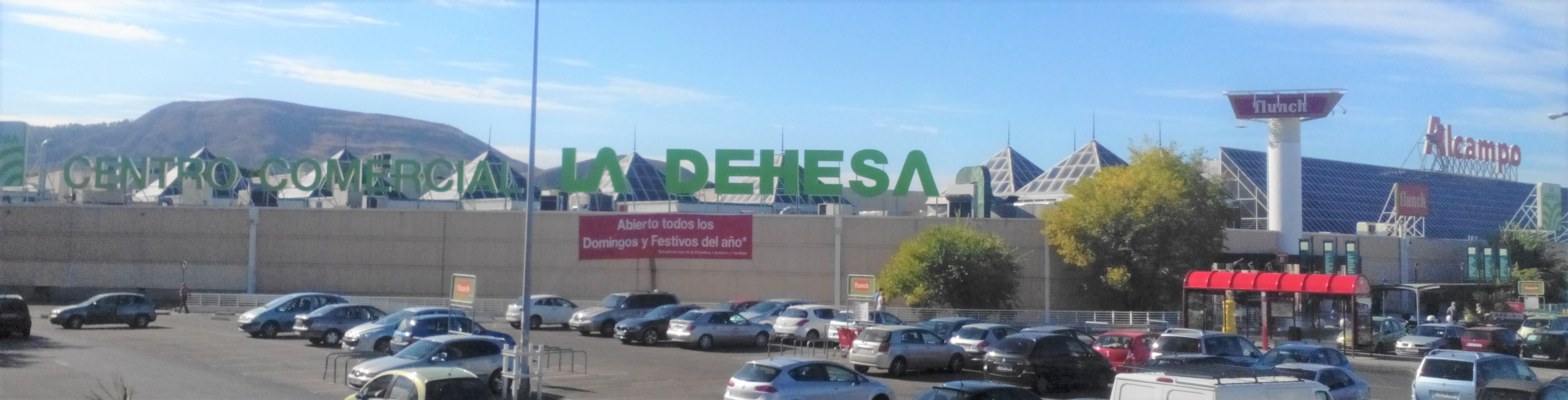 Vista panorámica del Centro Comercial La Dehesa, en el km 34,00 de la autovía A2, en Alcalá de Henares (Comunidad de Madrid - España). Inaugurado en diciembre en 1995.